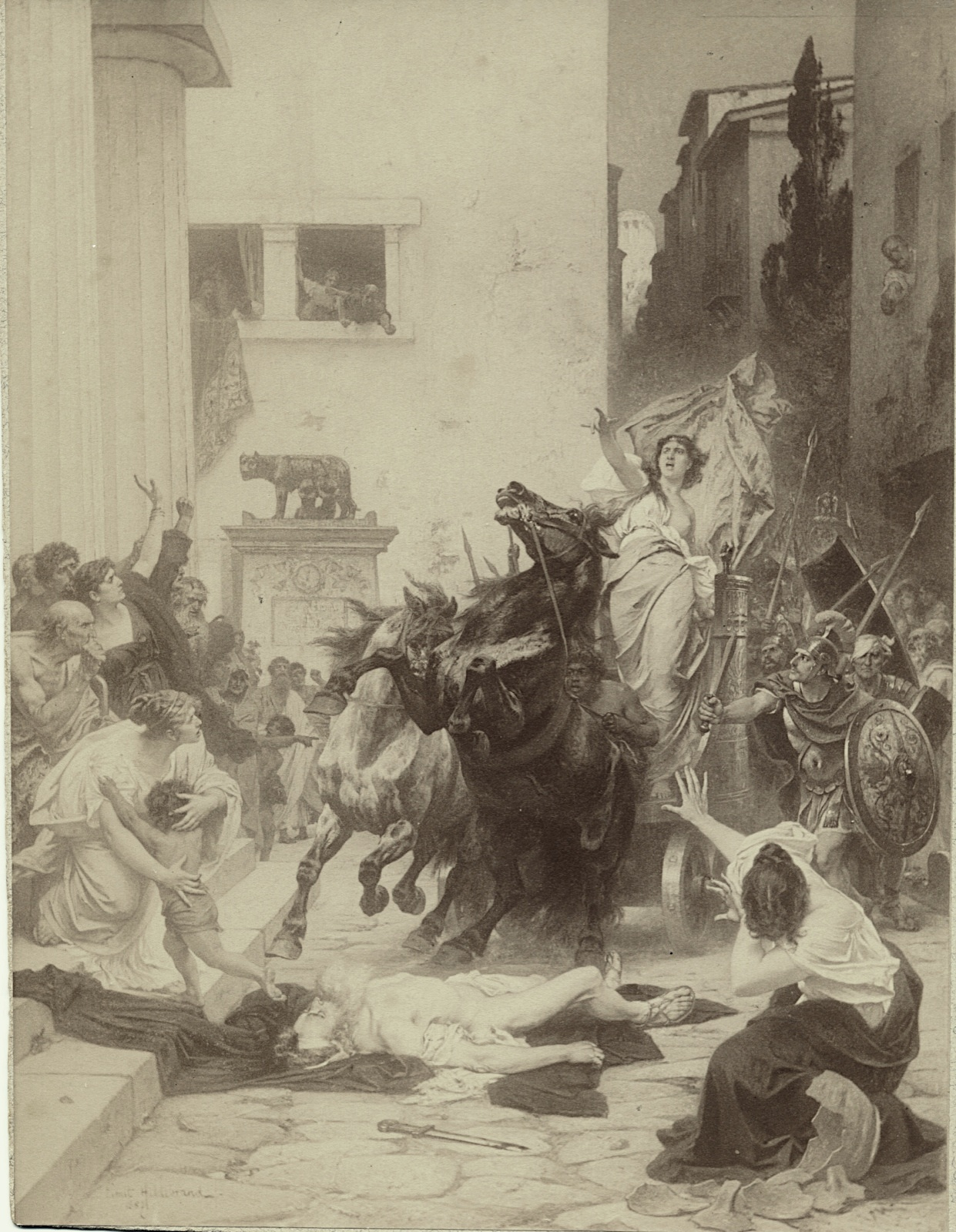 Tullia im Kampfwagen vor dem Capitol